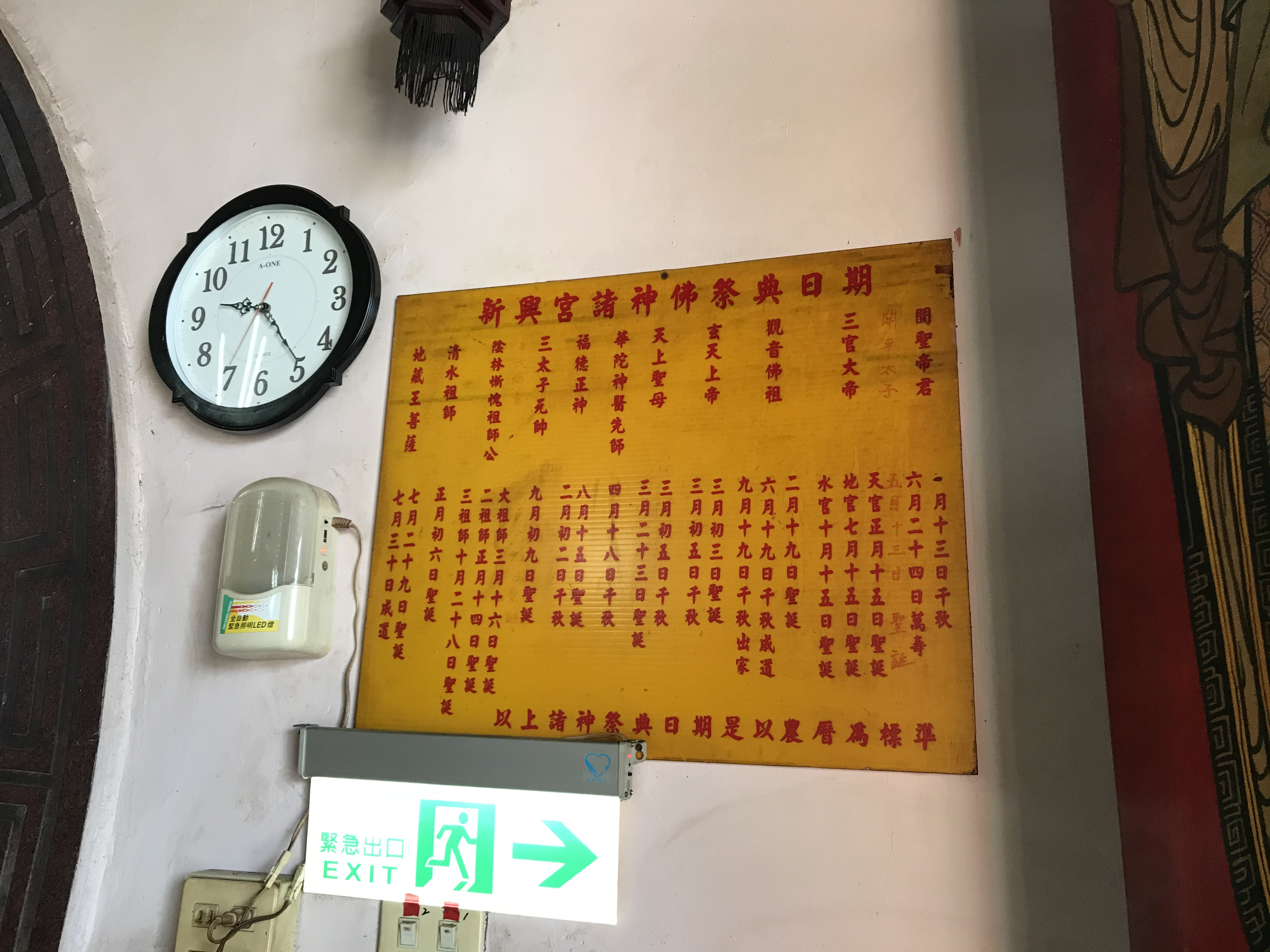 草屯新興宮祀神表